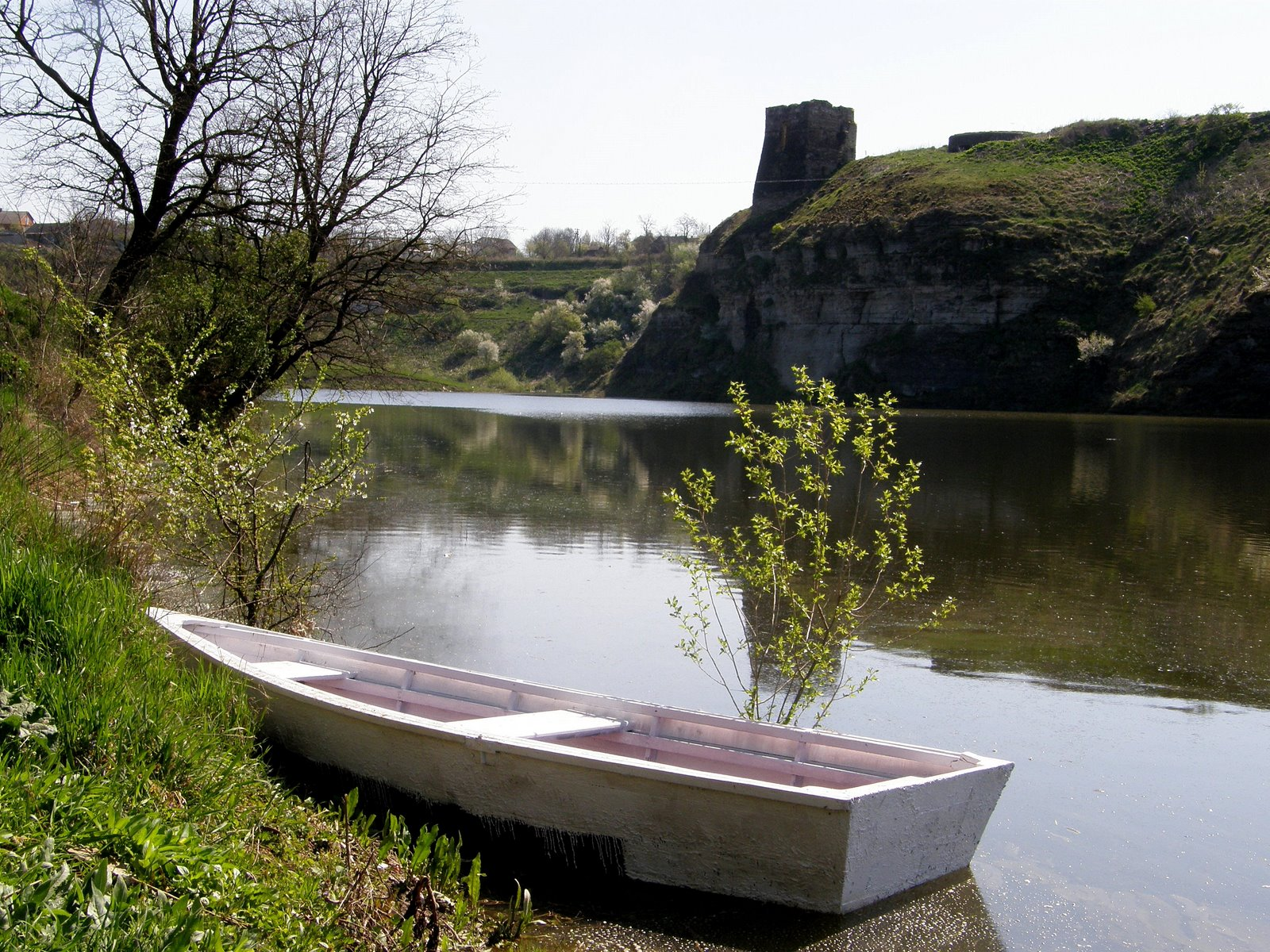 село Жванец, вид на бывший замок